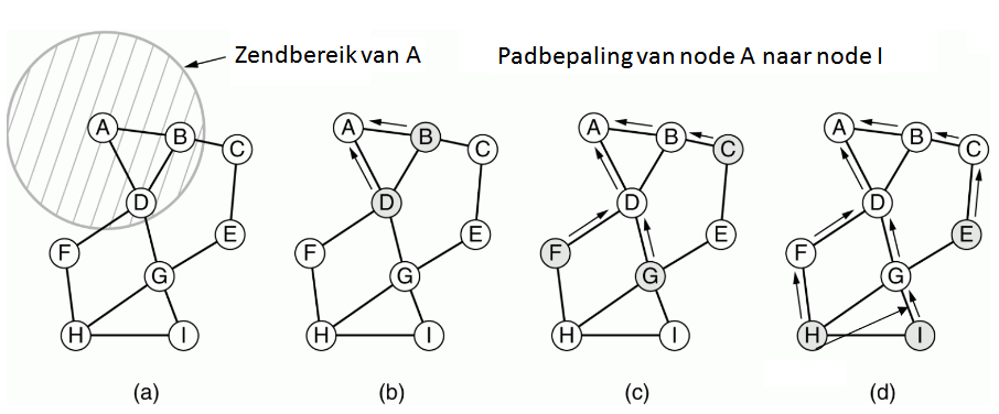 algoritme